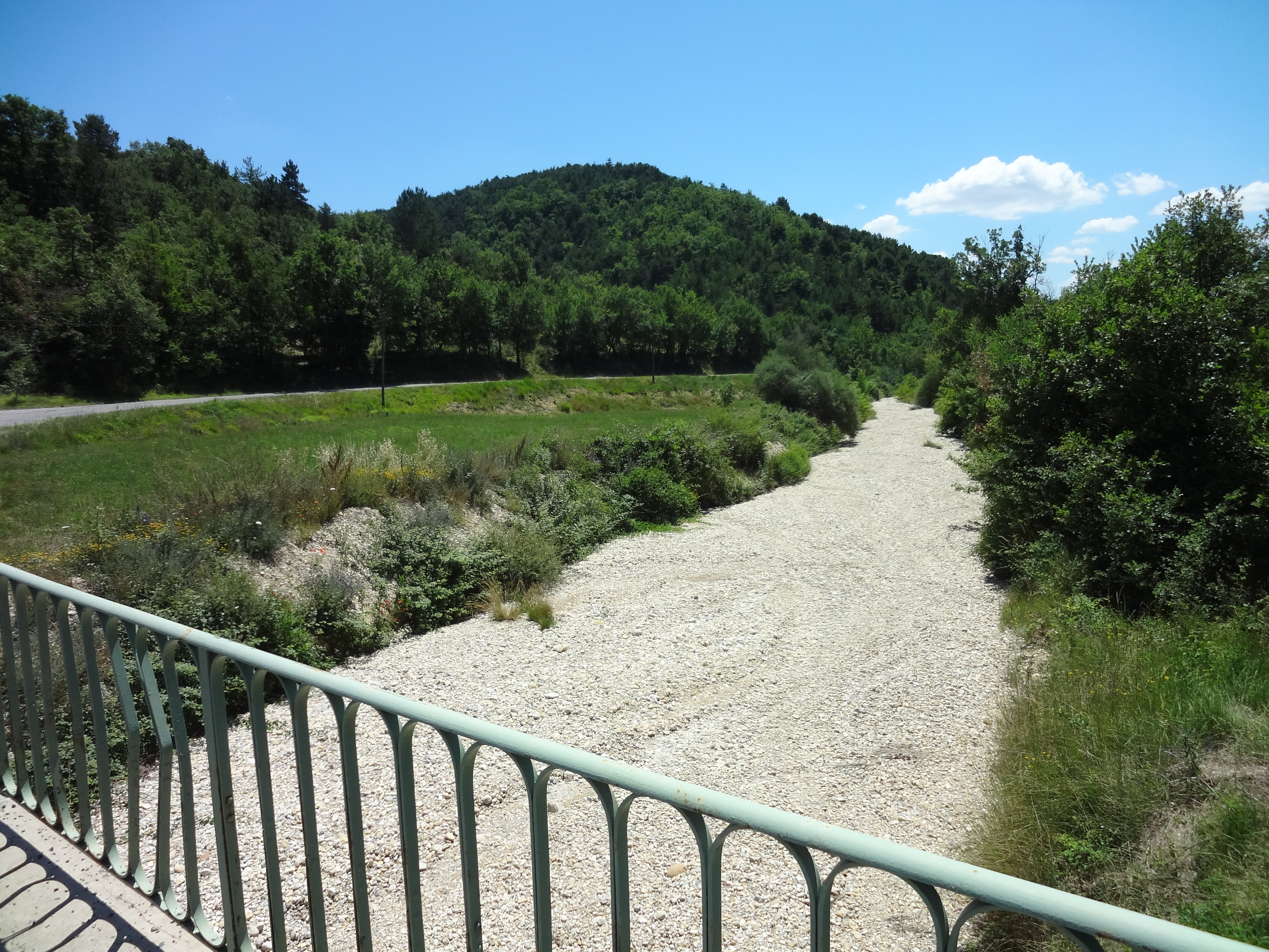 Ravin des Cardaires, à sec et fortement engravé